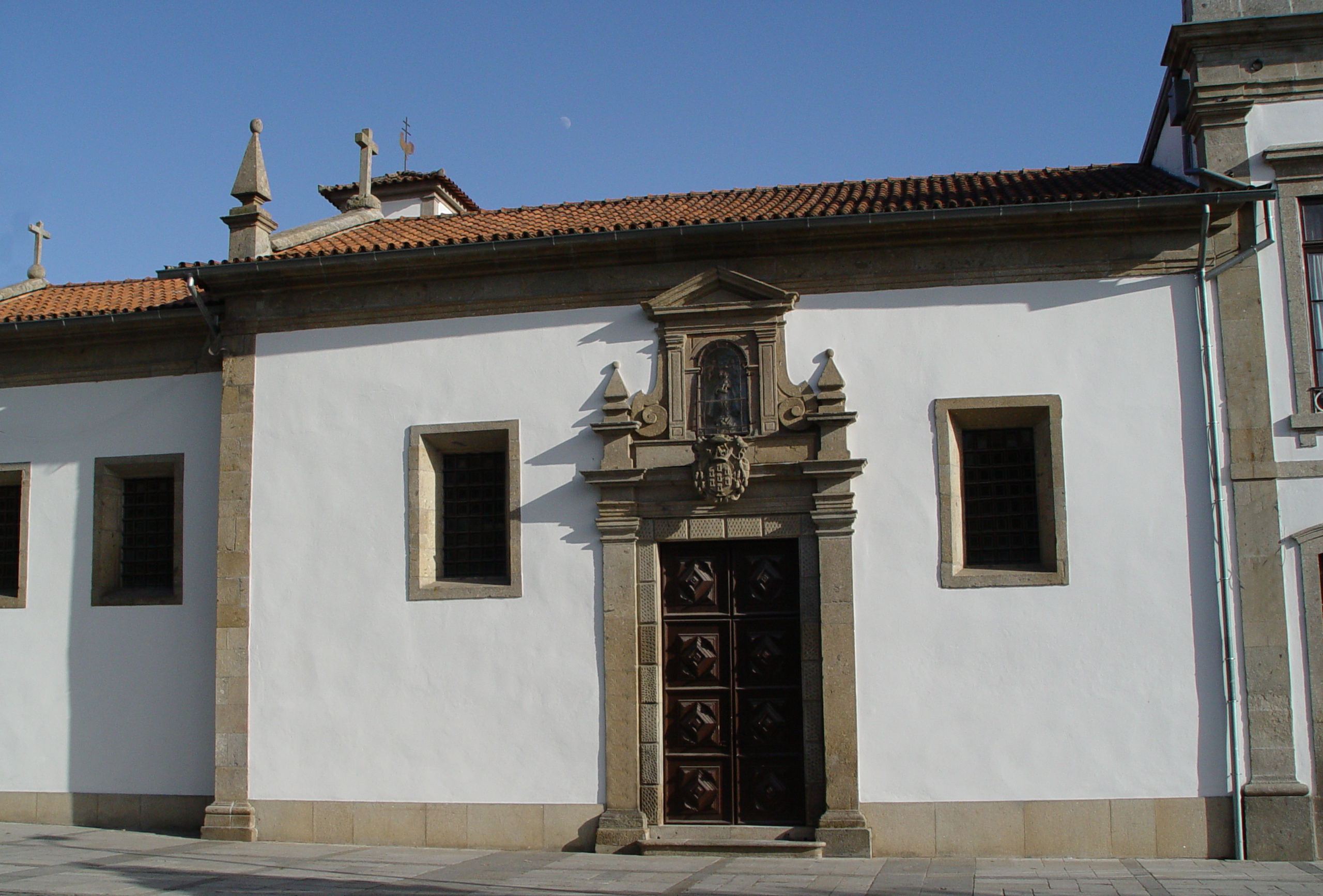 Penha Church in Braga, Portugal